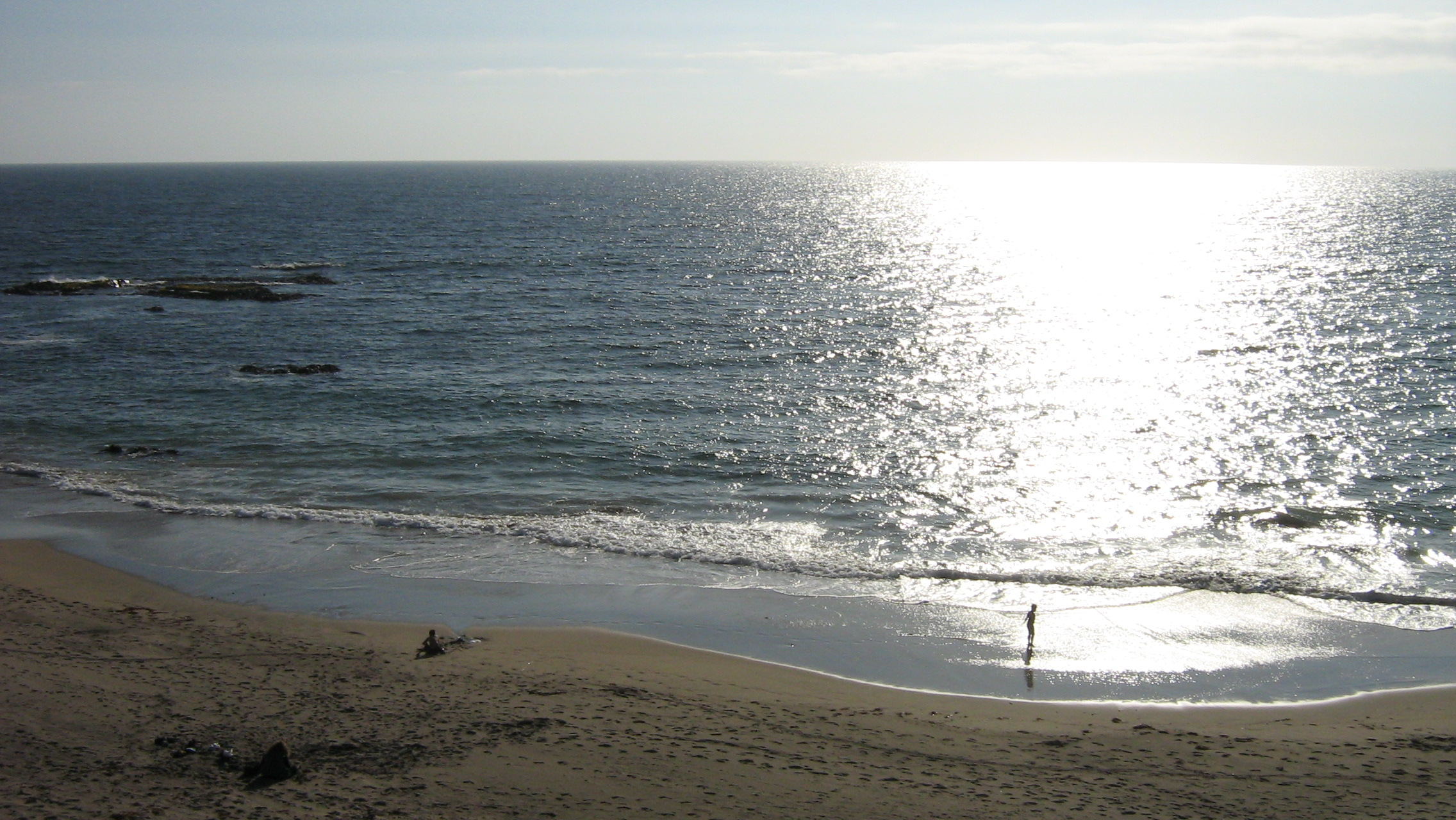 La Cebada